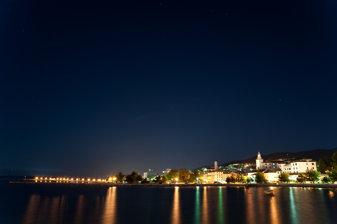 Crikvenica i Veliki medvjed